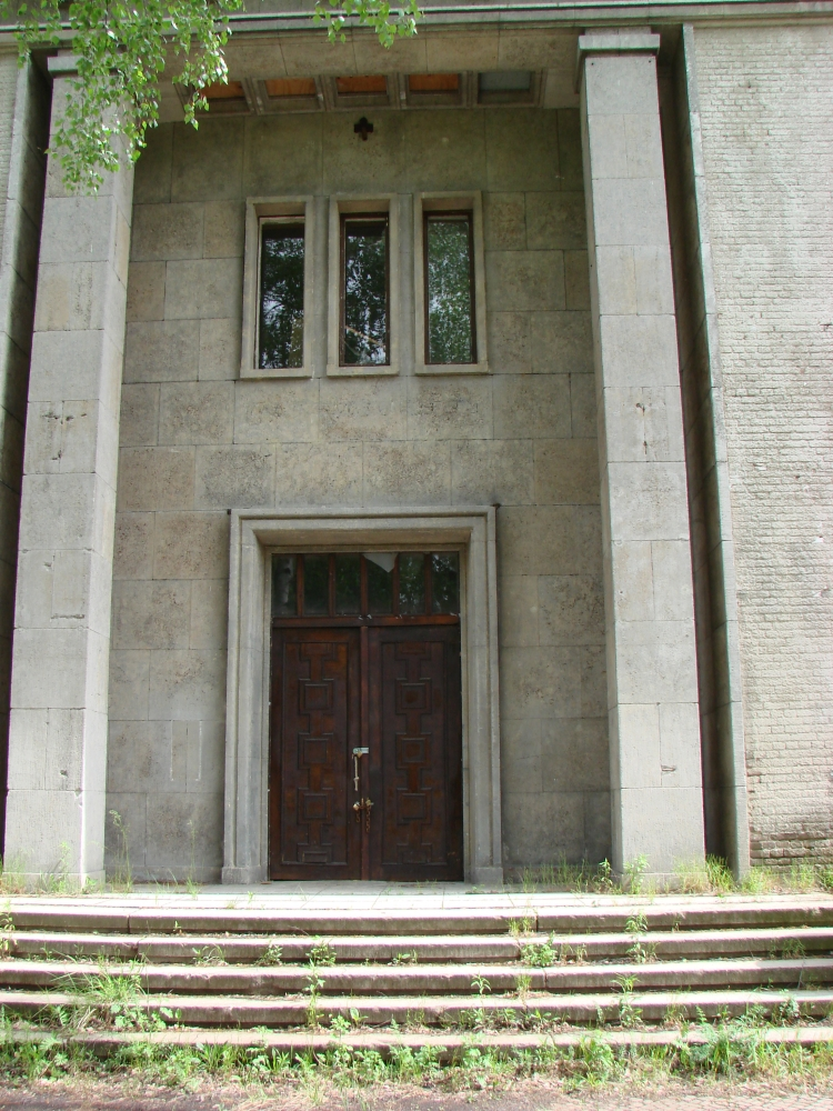 Das Bild zeigt den repräsentativen Haupteingang des Offizierskasinos der ehemaligen Kavallerieschule Krampnitz. Ort: Potsdam-Krampnitz, Land Brandenburg, Deutschland